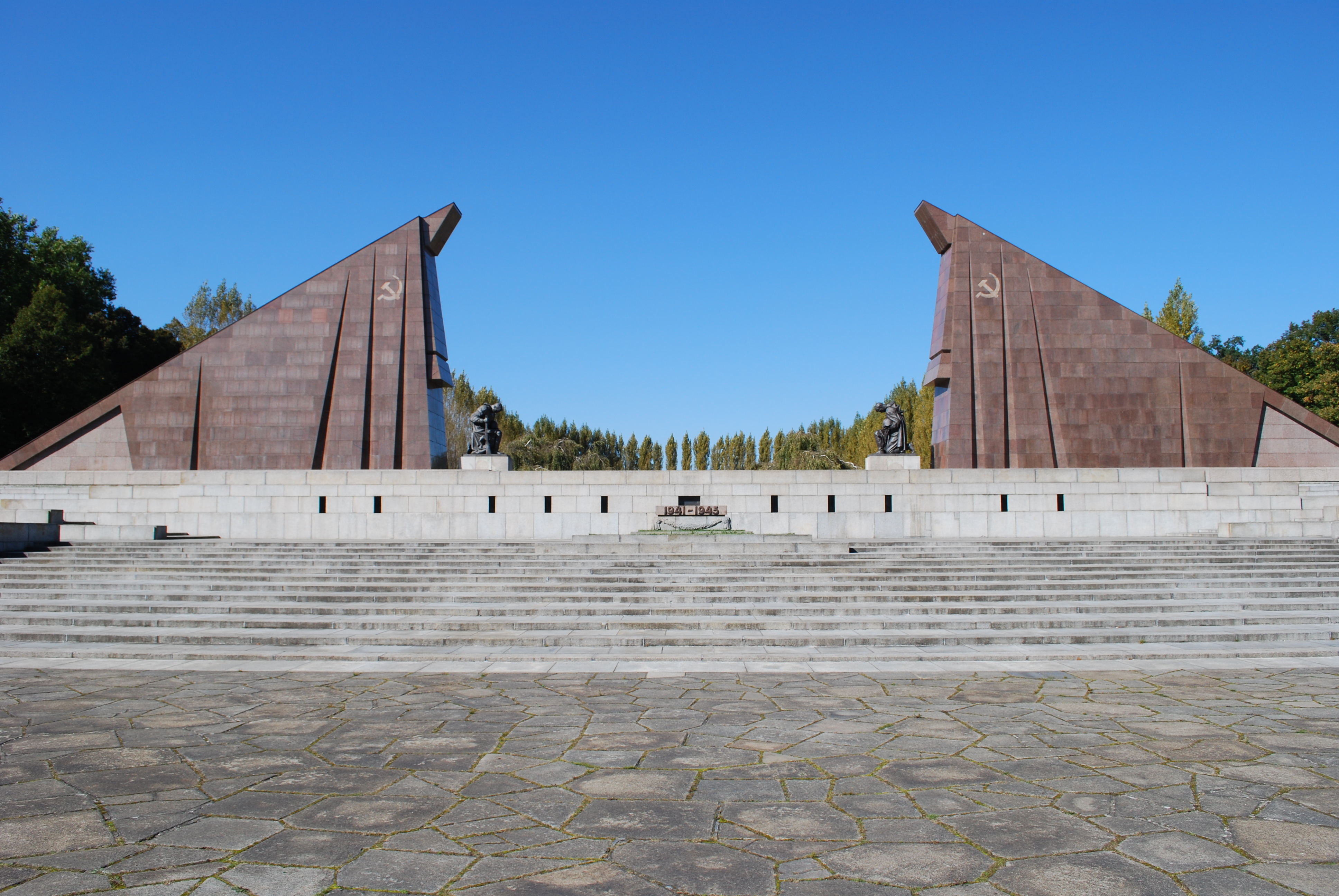 Sowjetisches Ehrenmal (Treptower Park), Nordwestansicht fern